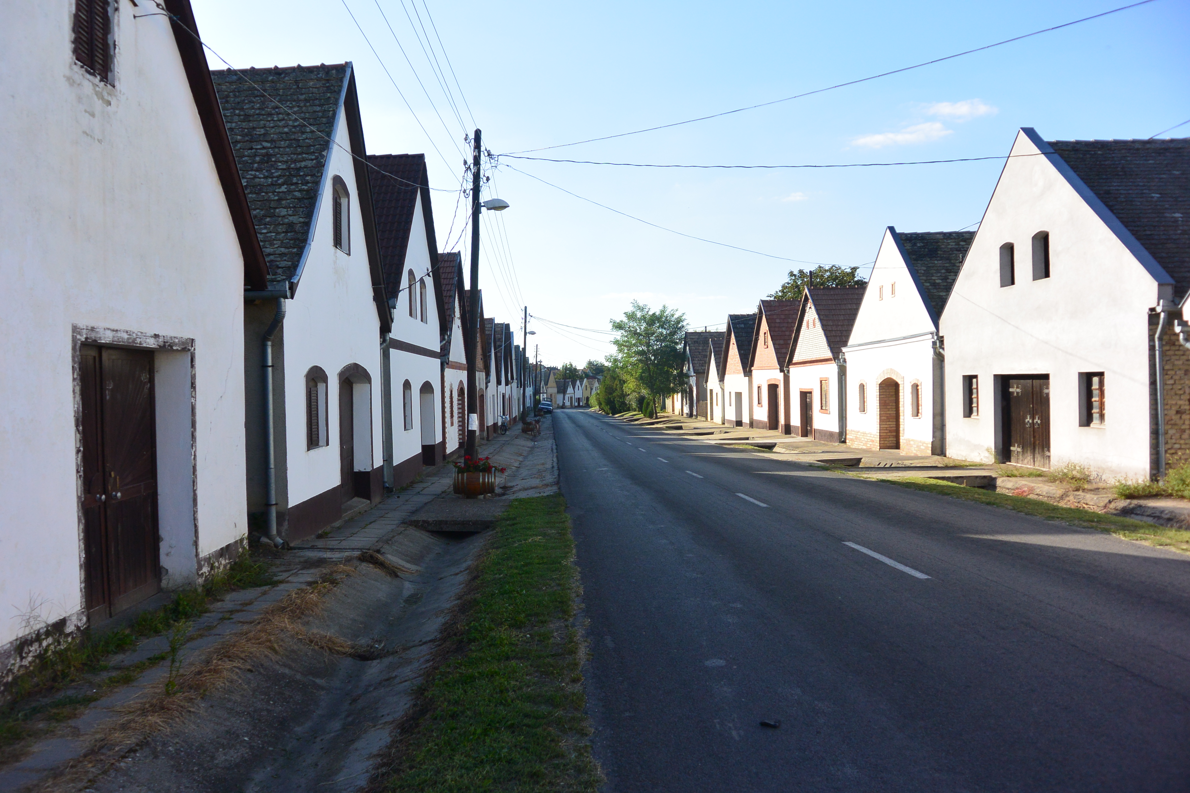 Borospincék egy nemesnádudvari utcában